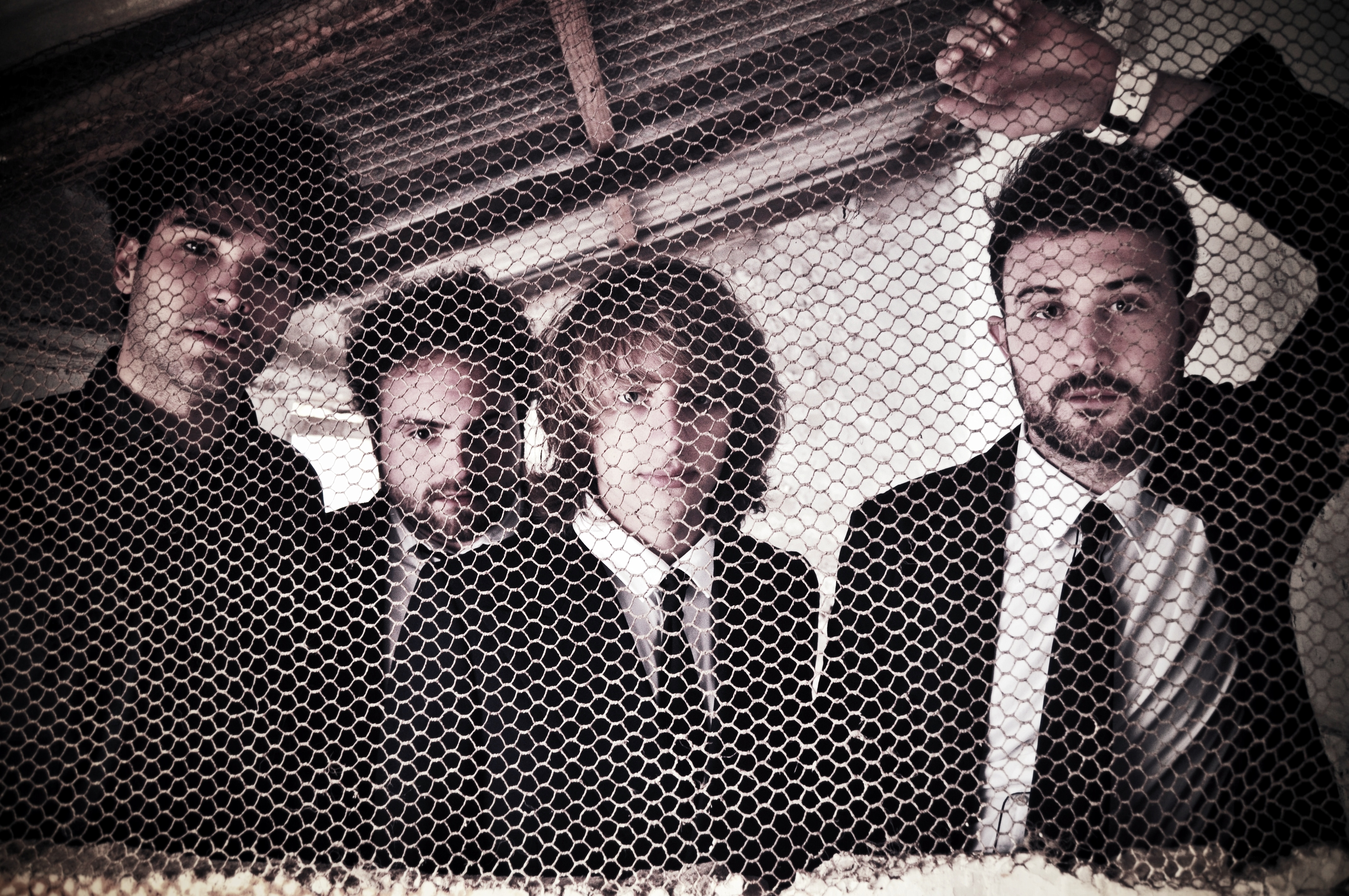 Grupo español Supersubmarina